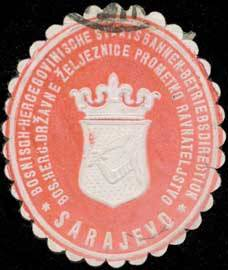 Sealing stamp Title: Bosnisch-Herzegovinische Staatsbahnen-Betriebsdirection Sarajevo Description: Eisenbahn, rot, weiß, geprägt Place: Sarajevo size: 4x4 cm